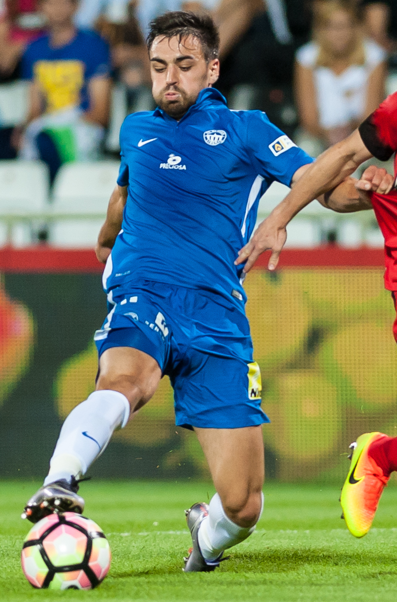 20160728 Europa League - FC Admira Wacker Moedling vs FC Slovan Liberec. Bild zeigt David Hovorka (FC Slovan Liberec) und Thomas Ebner (ADM).